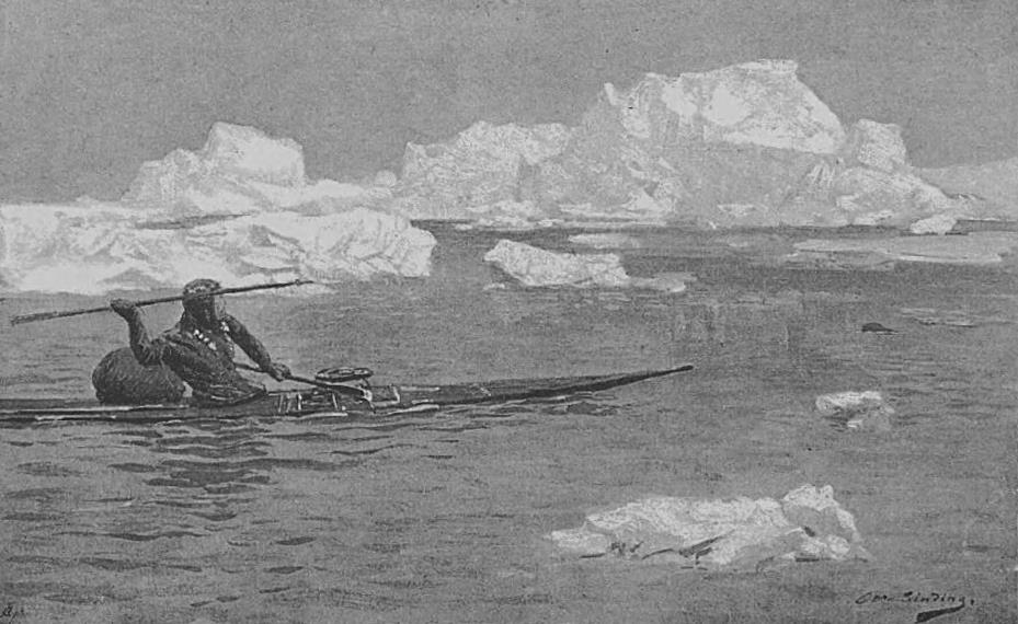 Plansch ur Eskimålif, 1891. Ursprunglig bildtext: "Säljakt".